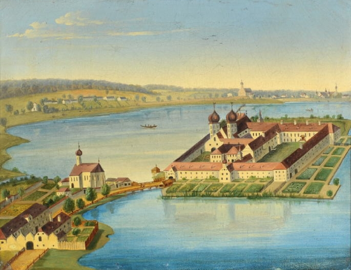 Kloster Seeon, Öl/Lwd, 26,5 x 34 cm